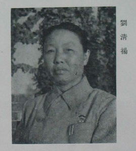 中國人民政治協商會議第一屆全體會議代表